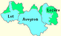 Départements du bleu des causses